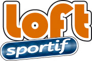 Logos